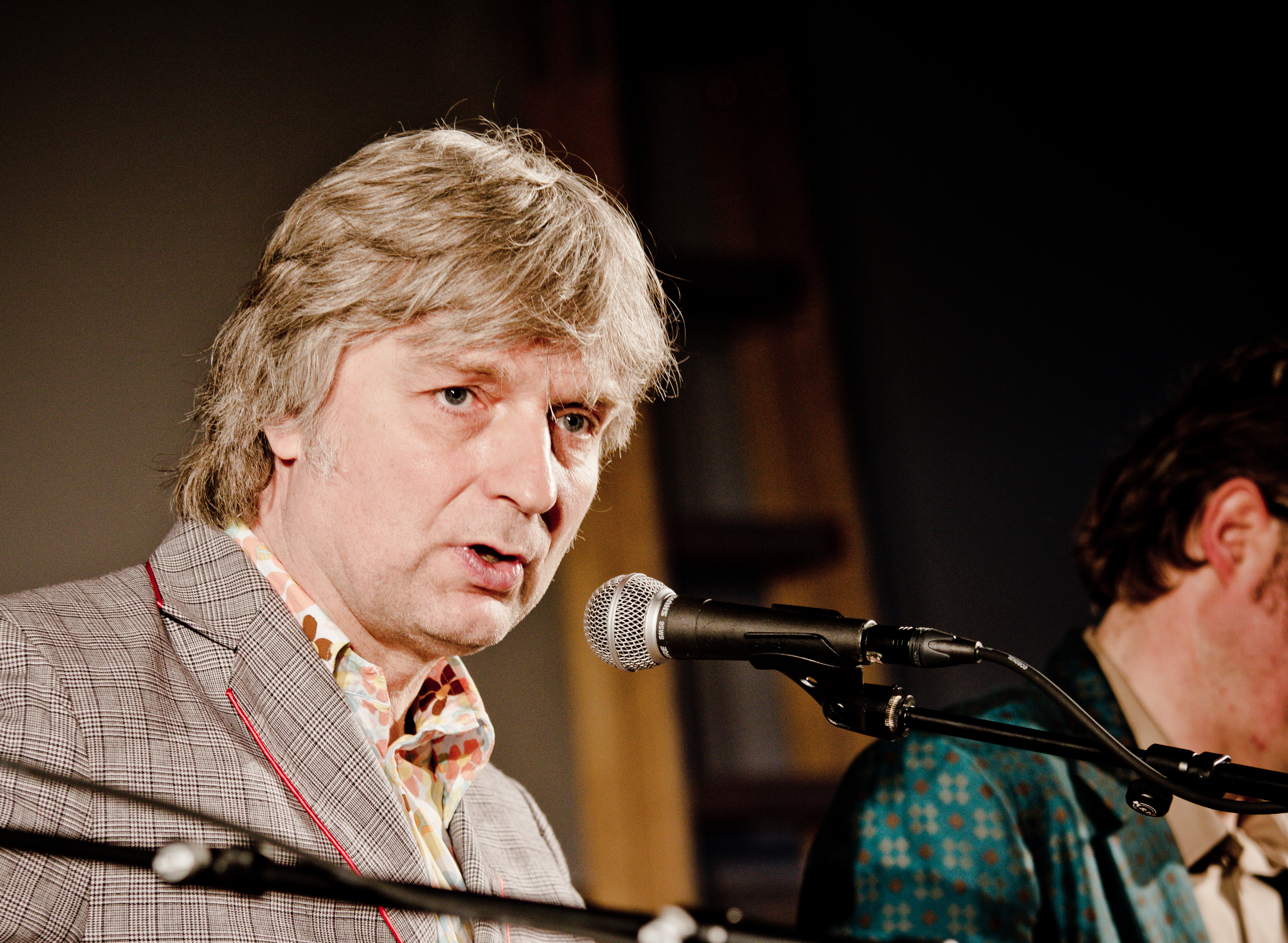 Auftritt der Band „Erdmöbel“ am Tag der Archive im Restaurierungszentrum des Historischen Archivs der Stadt Köln. Köln-Porz. Bass: ekimas